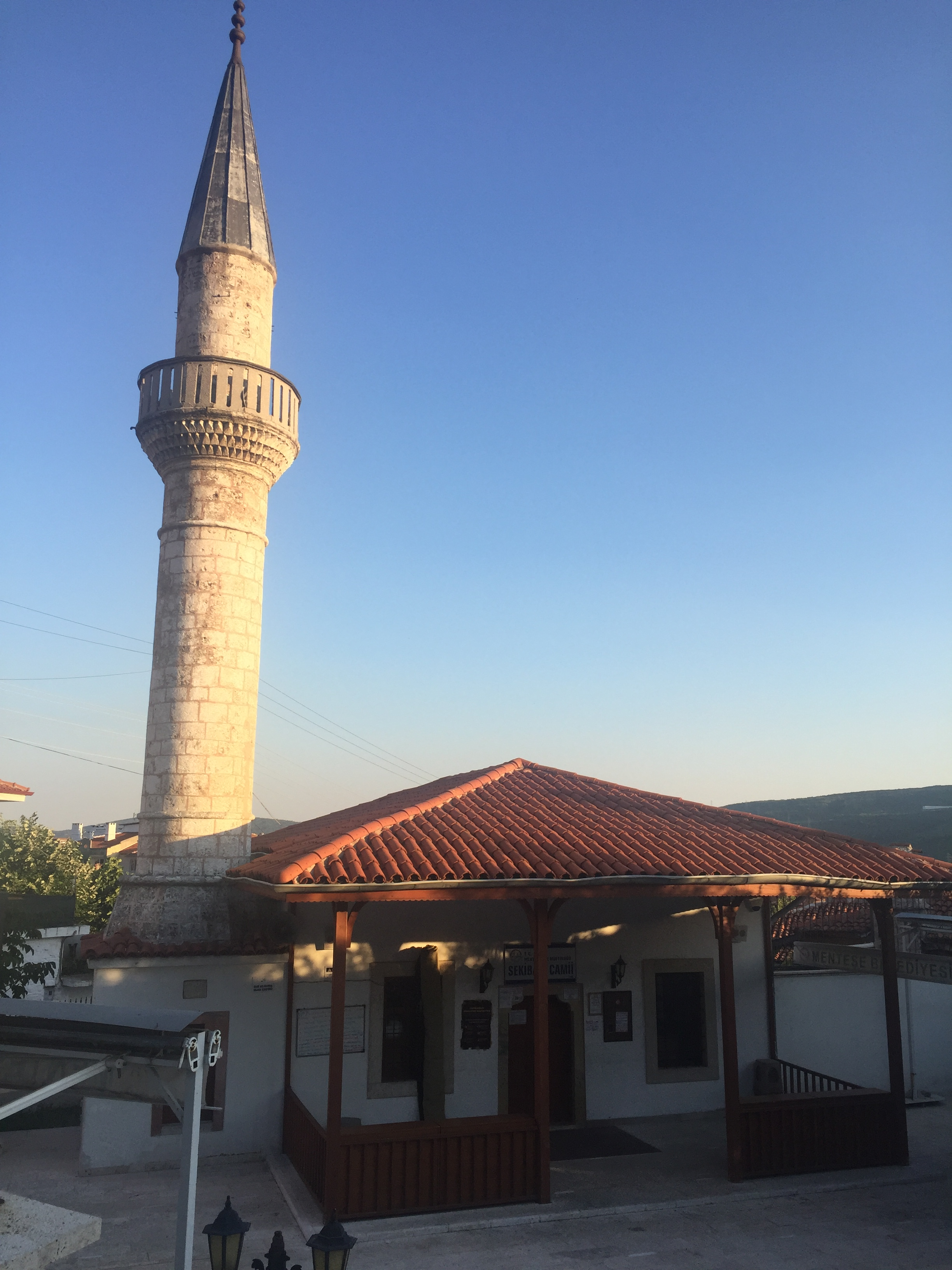 Sekibaşı Camii, Muğla